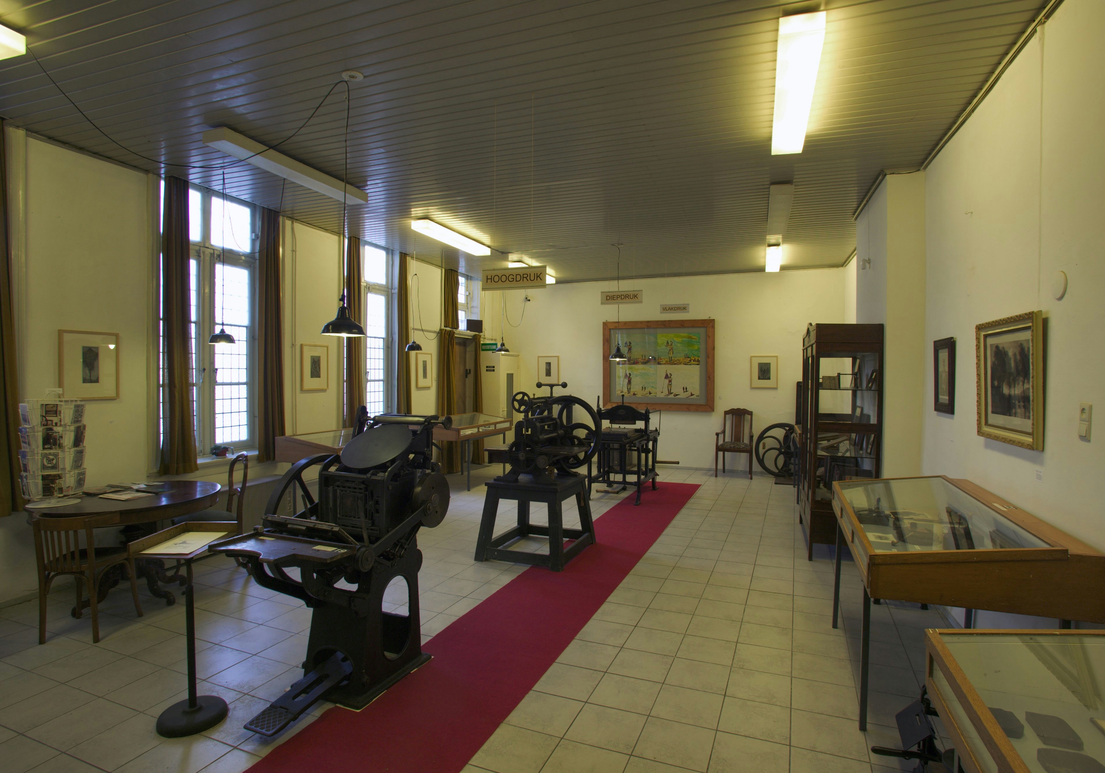 Drukkerijmuseum: Interrieur, begane grond, overzicht